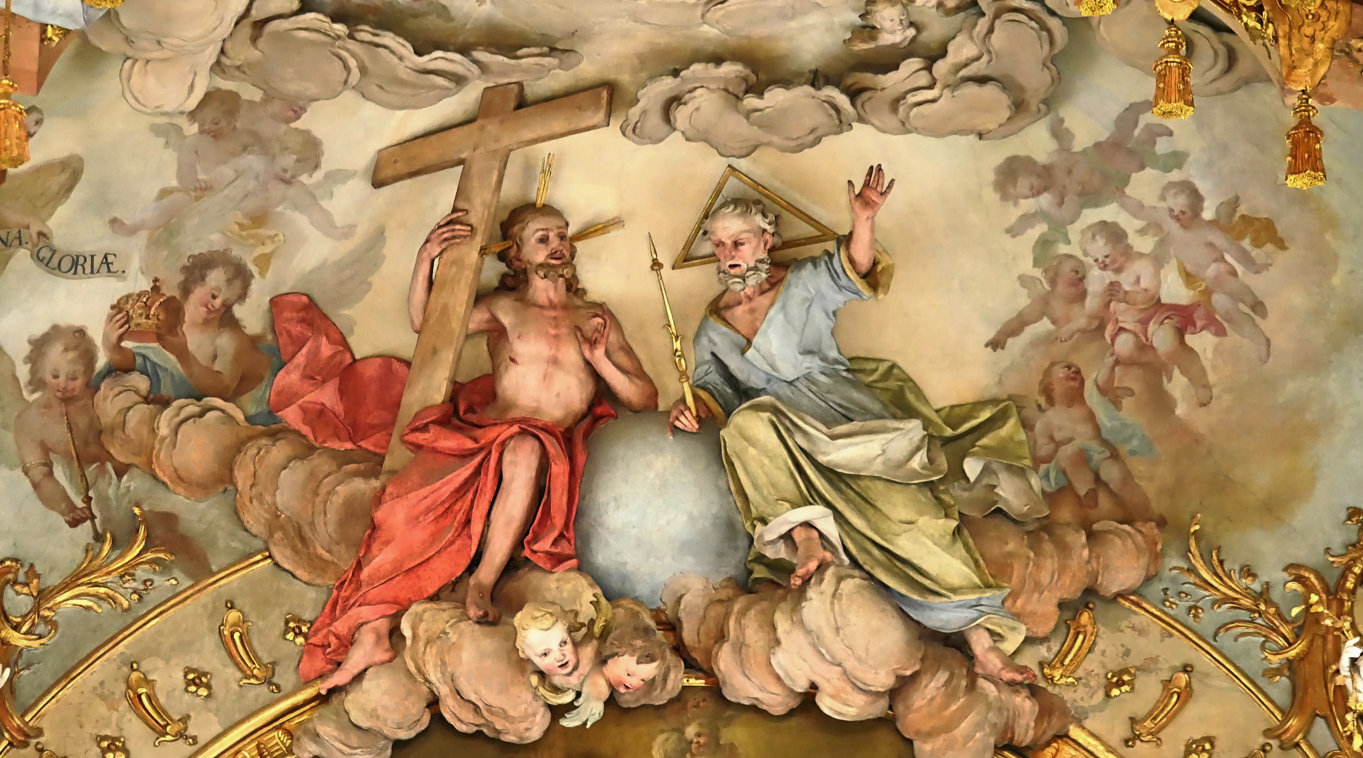 Gottvater und Gottsohn in einer Dreifaltikeitsdarstellung in der Wallfahrtskirche Maria Steinbach (die Taube des hl. Geists schwebt weit über diesen)